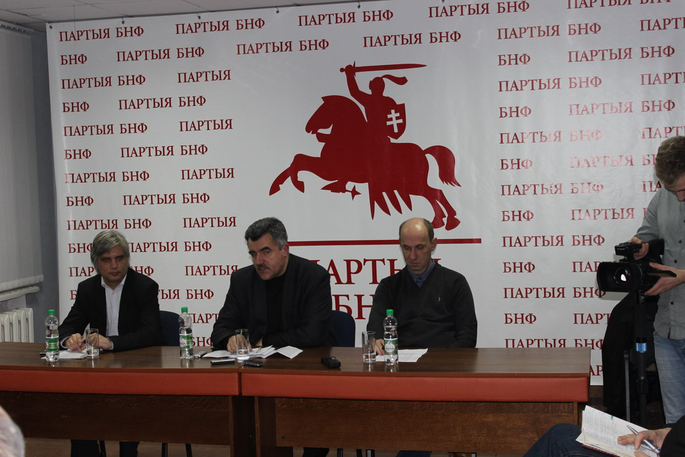 Слушания 16.12.2014 в Минске по военным базам